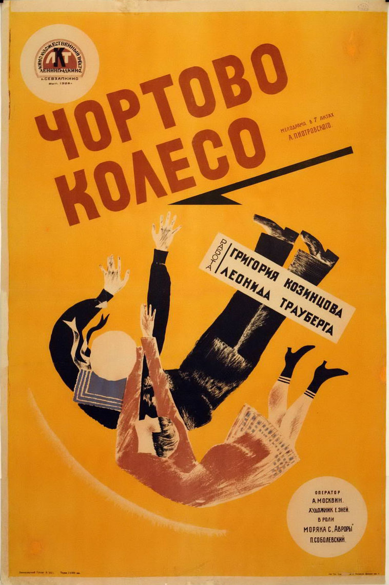 Плакат к советскому художественному фильму «Чёртово колесо» (Производство Ленинградкино, реж. Григорий Козинцев, Леонид Трауберг). Ленинград: Издание Ленинградкино, [1926]. Хромолитография, 107×71 см. Тираж 20 000 экз.